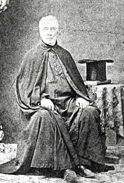 Dominic Anthony Fahy (1805-1071), sacerdote irlandés y virtual jefe de la comunidad irlandesa en Argentina entre 1844 hasta 1871.